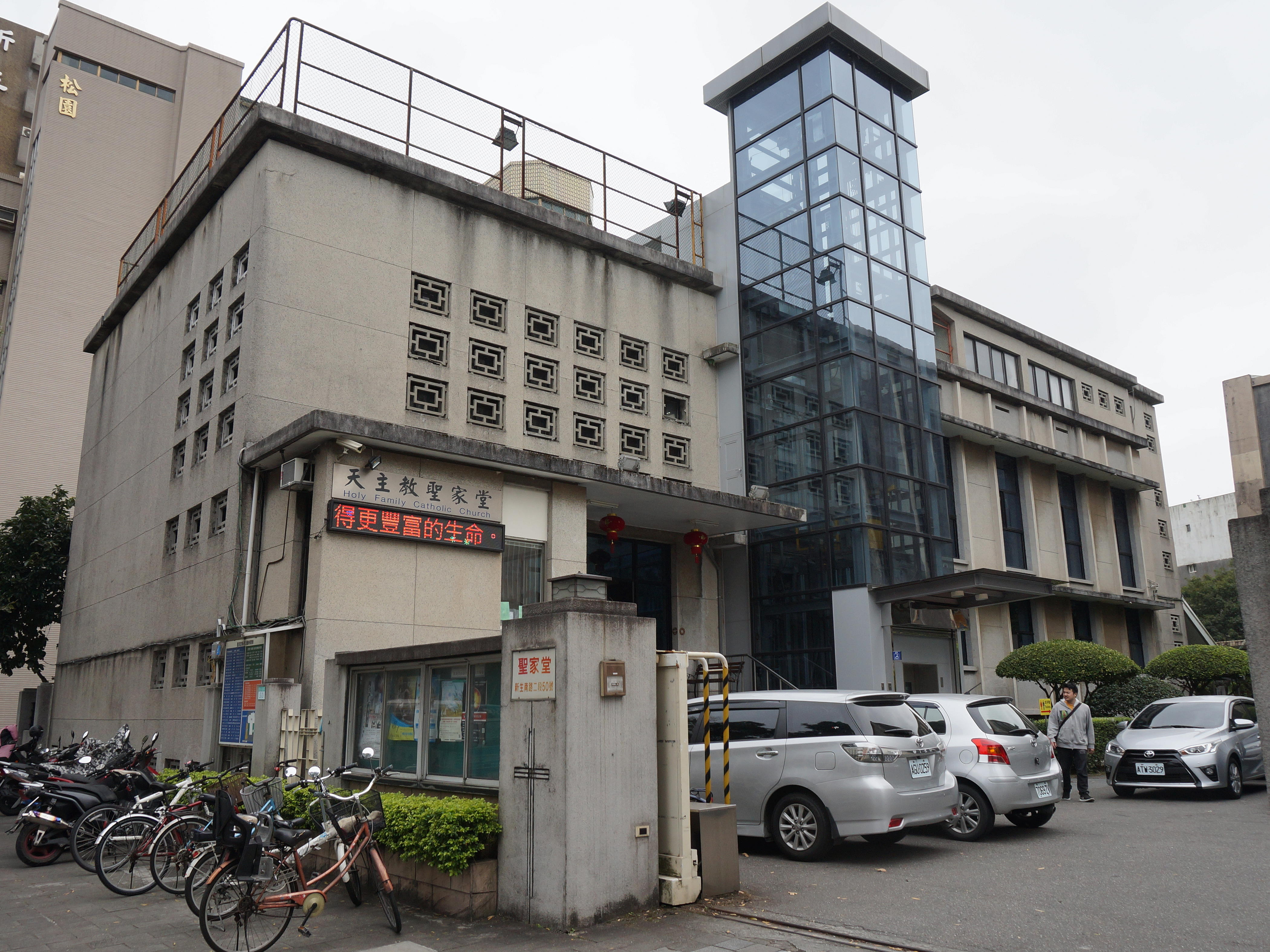 天主教台北總教區台北聖家堂A棟。